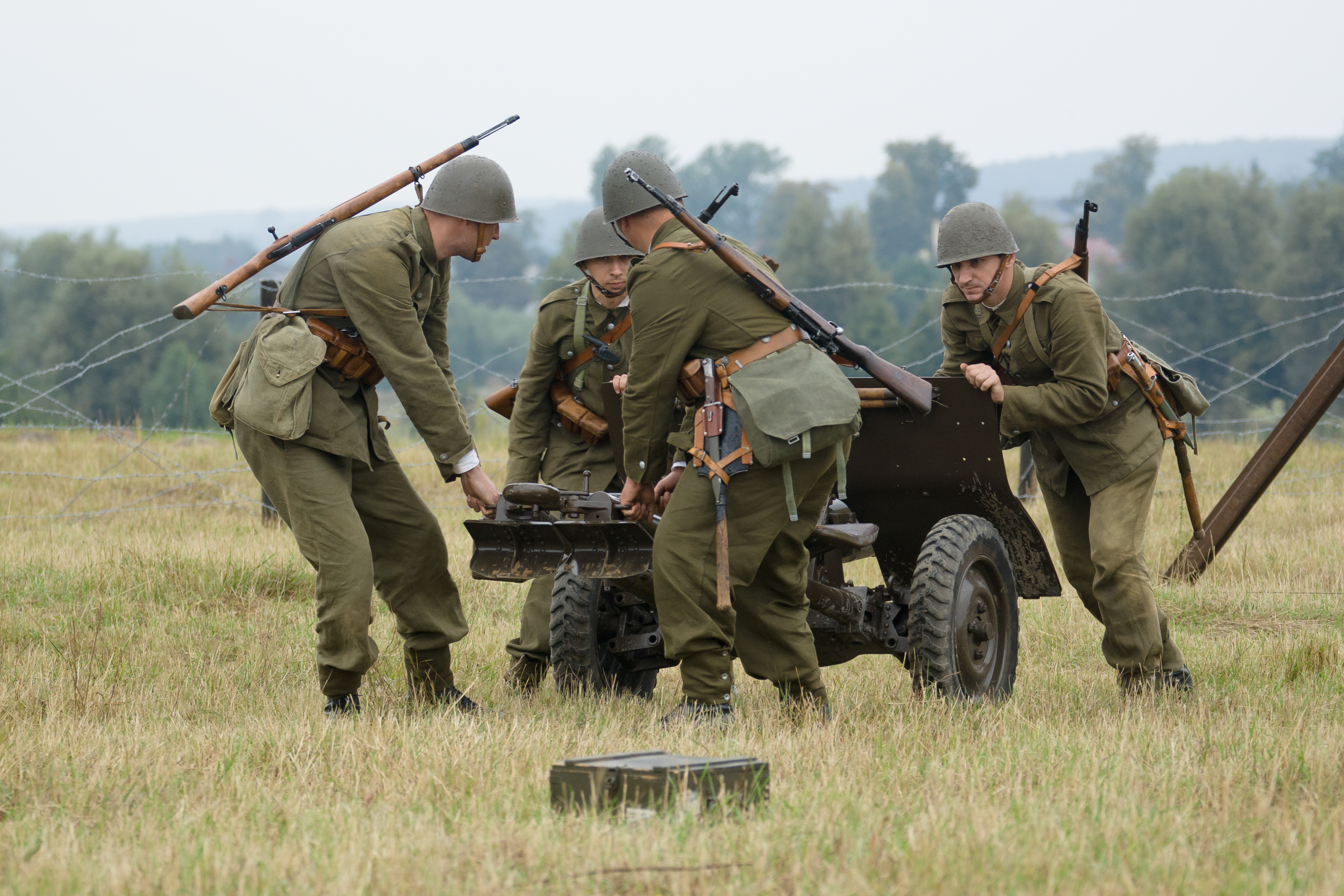 V rekonstrukcja Bitwy pod Mławą, 1. września 2012.